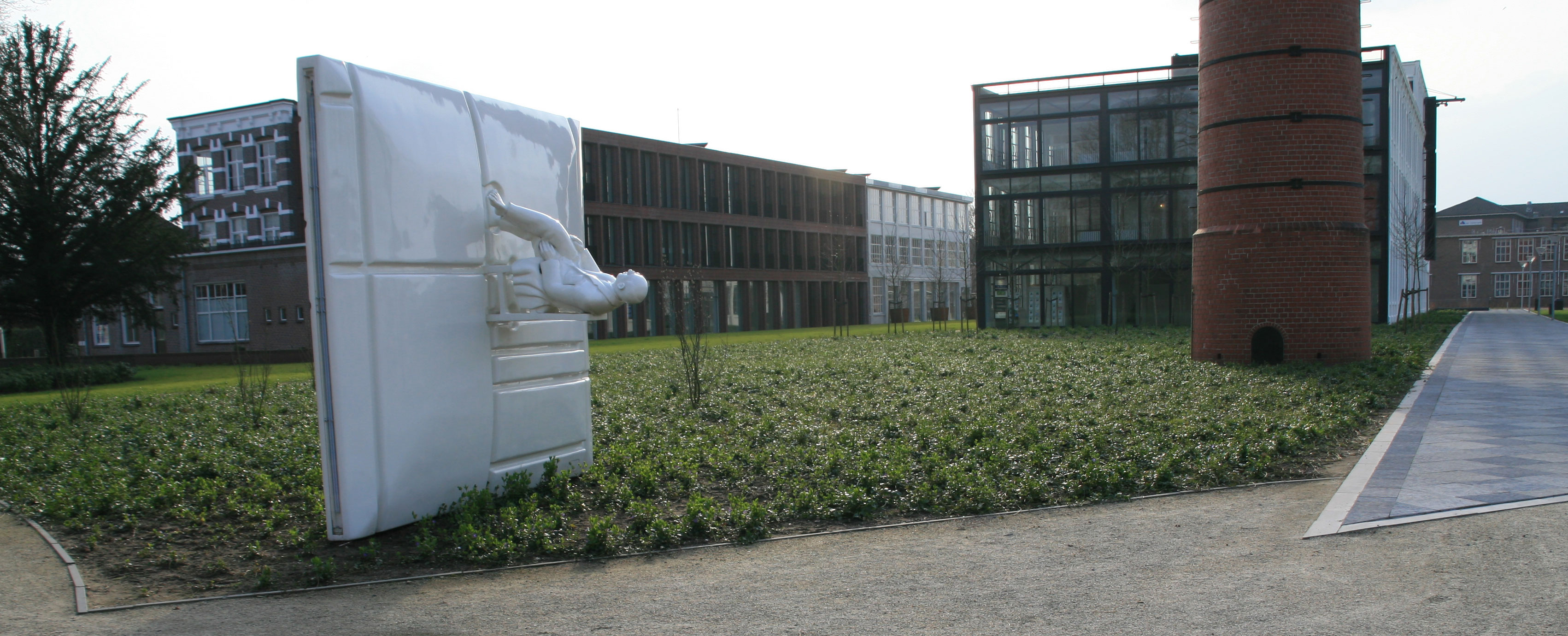 Tricotfabriek Winterswijk: Aanzicht met Mondriaan monument op de voorgrond